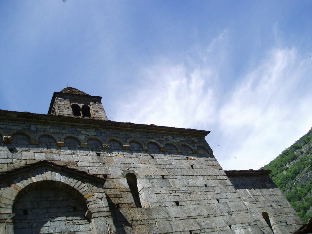 Die Kirche San Nicolao in Giornico (TI). selbst fotografiert